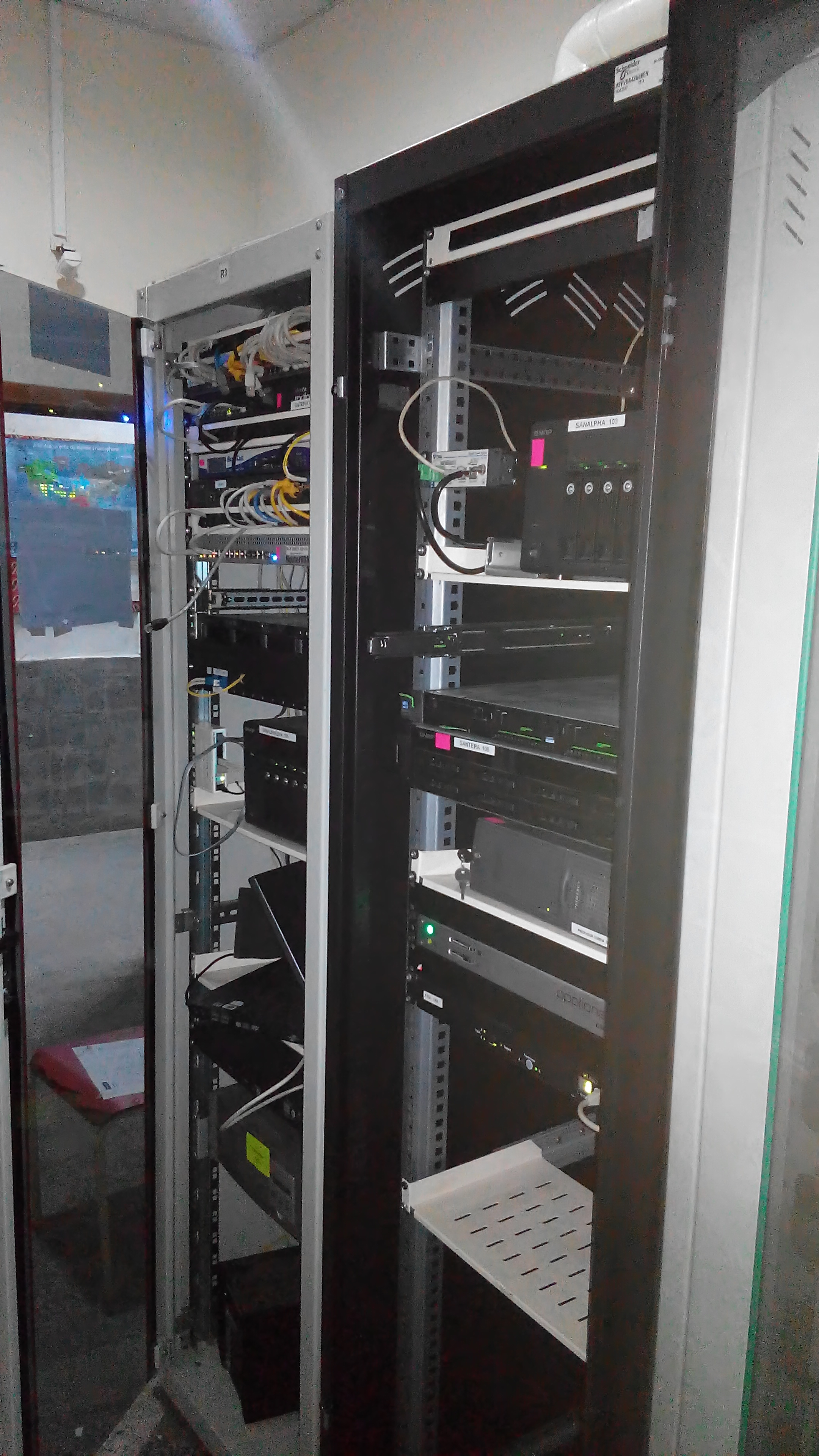 Serveur du Centre de Documentation de l'Enseignement Supérieur Universitaire et de Recherche à Kinshasa. La salle serveur du CEDESURK, où passe la connexion Internet